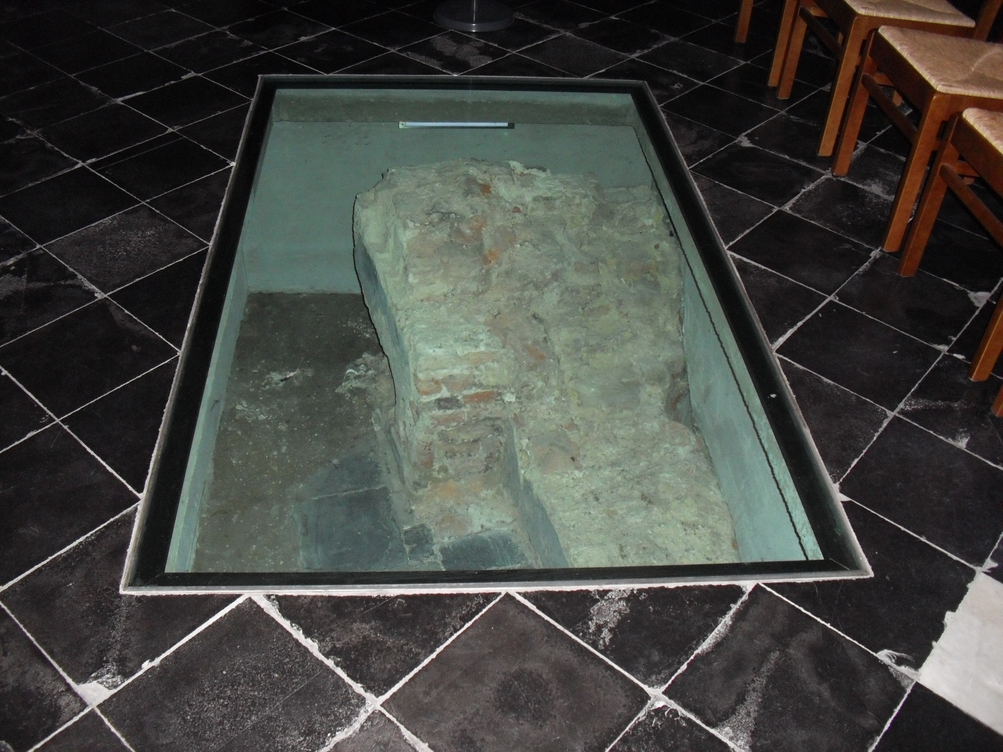 Fundering oude kerk - Sint-Vincentiuskerk - Eeklo - Oost-Vlaanderen - België